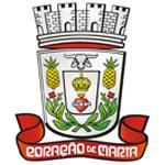 Brasão de Coração de Maria, Bahia, Brasl